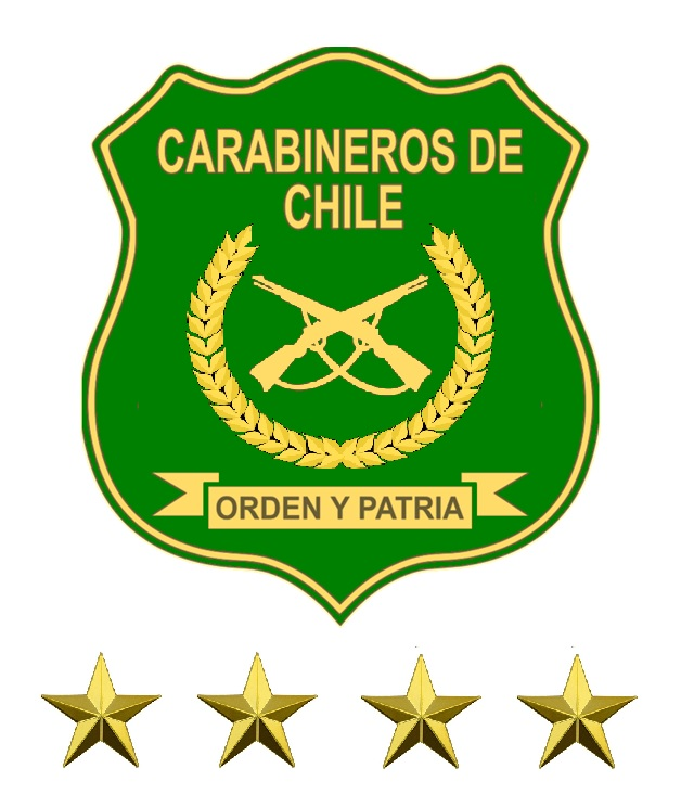 emblema general director de carabineros